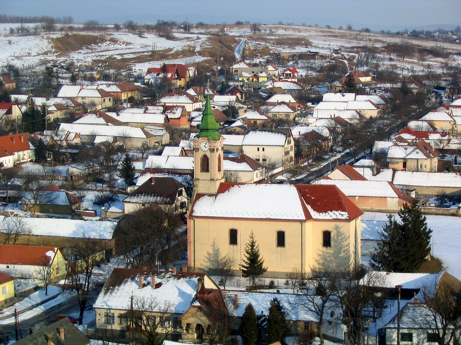 Nógrádi látkép